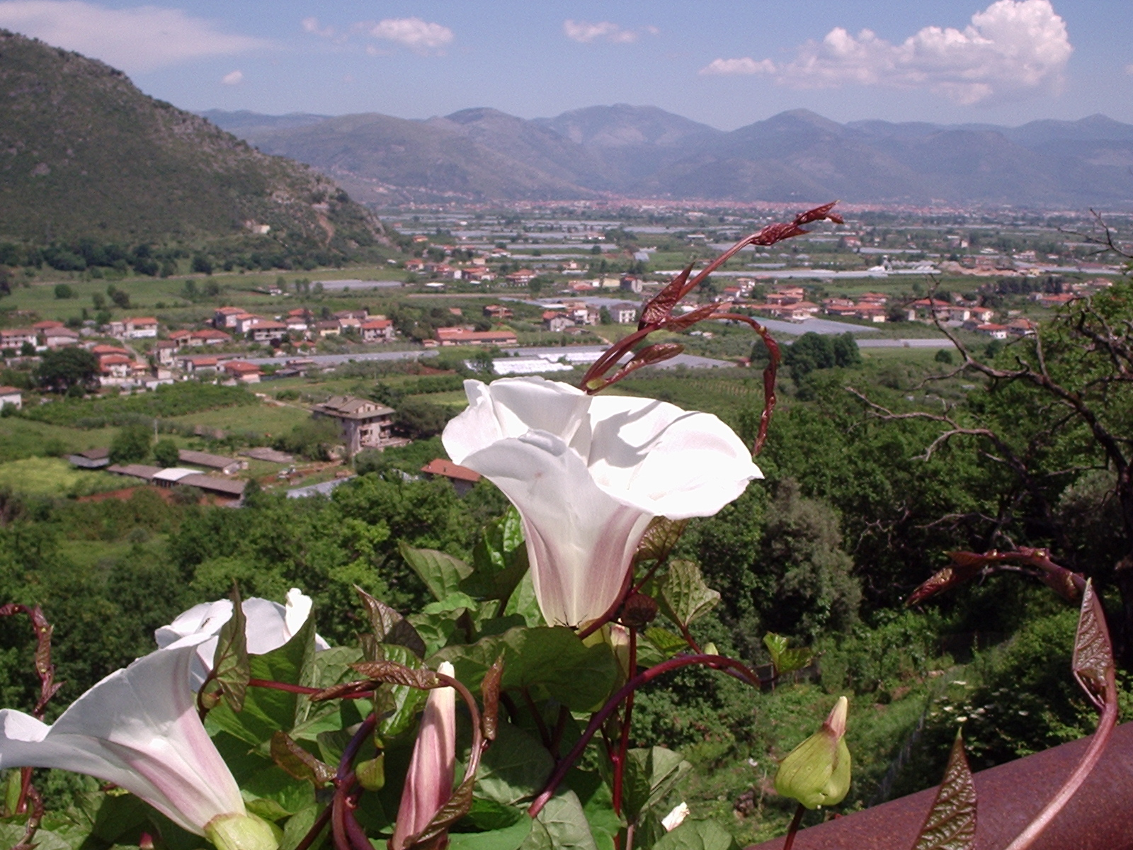 Convolvolo Calystegia silvatica verso Fondi